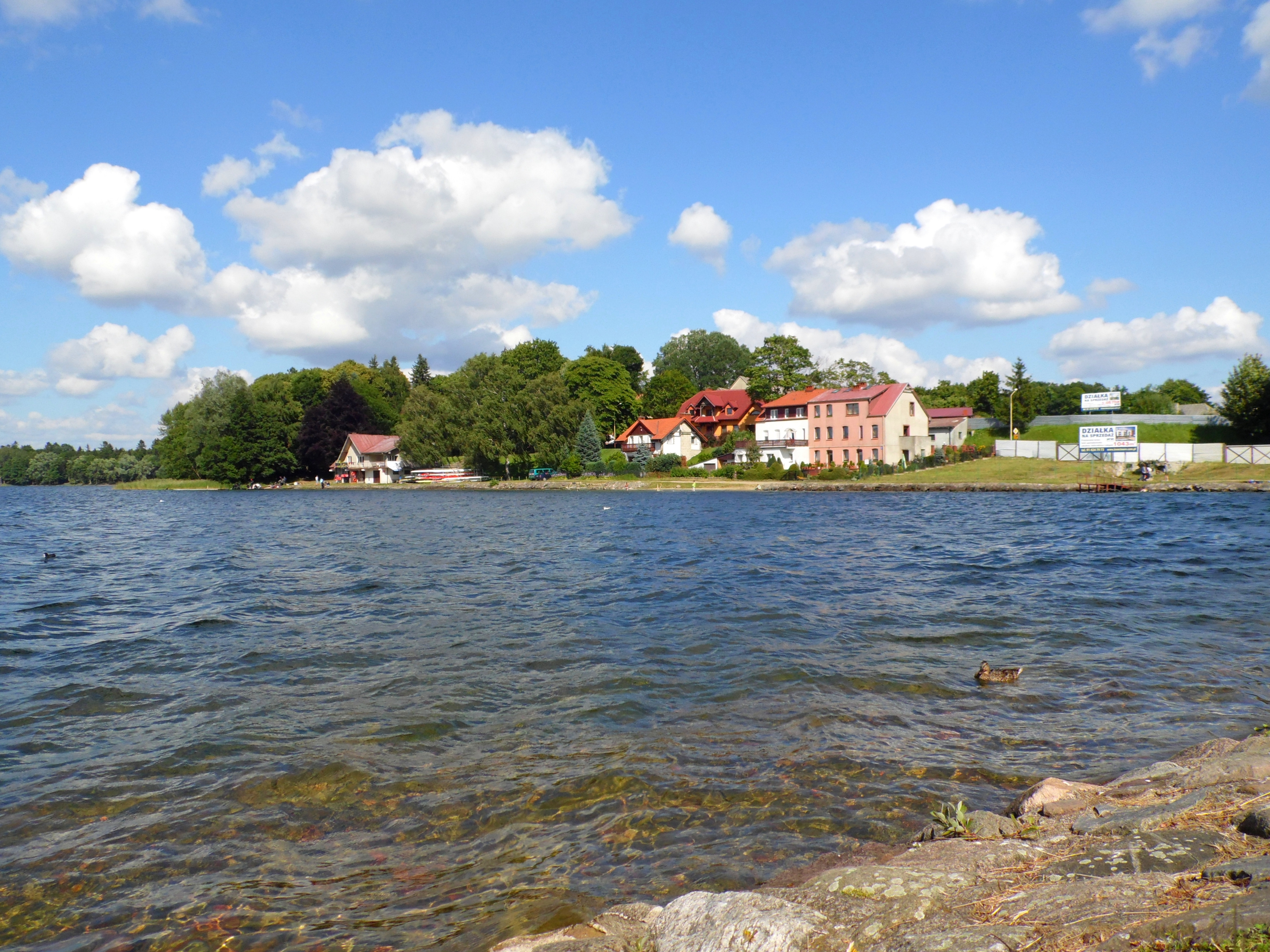 Ińsko